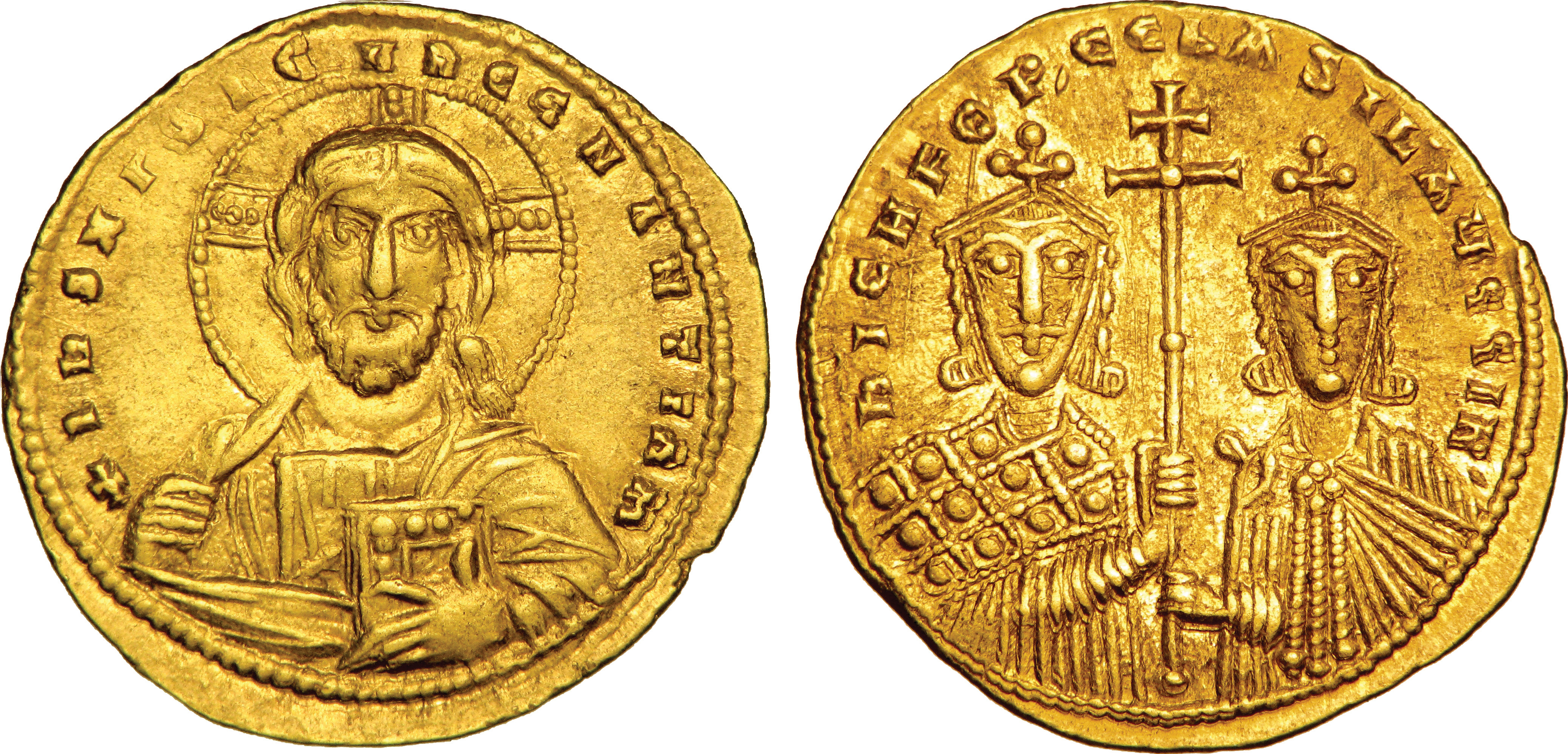 Nom de l'atelier : Constantinople Métal : or Diamètre : 21mm Axe des coins : 6h. Poids : 4,37g. Titulature avers : + Ihs XPS REX - REGNANTIYM. Description avers : Buste du Christ de face, portant le nimbe crucigère, vêtu du pallium et du colombium, la main droite bénissante et tenant de la main gauche les Évangiles. Traduction avers : (Jésus-Christ roi des rois). Titulature revers : nICEFOR’ CE bASIL’ AVGG In. Description revers : Bustes vus à mi-corps de Nicéphore II à gauche et de Basile II à droite ; ils sont couronnés, Nicéphore II porte le loros et Basile II la chlamyde ; ils tiennent tous deux la croix patriarcale bouletée. Traduction revers : (Nicéphore et Basile augustes rois des Romains).